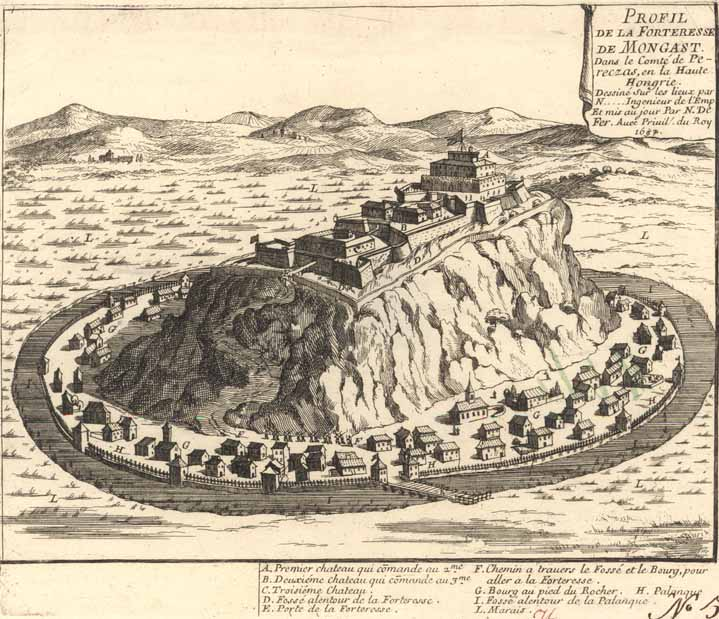 Мукачівська фортеця.